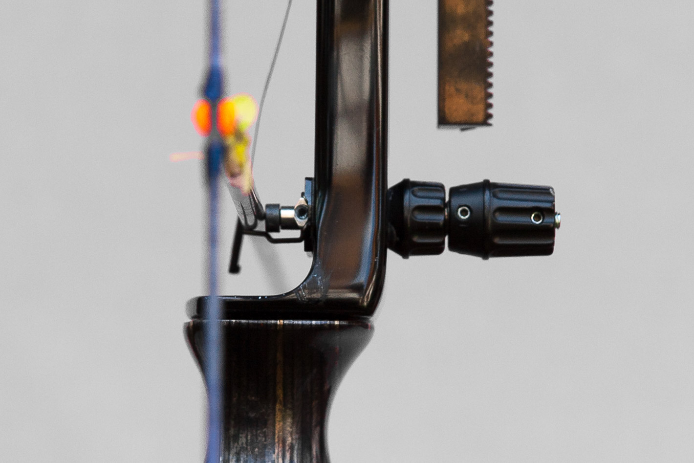 Button in einem Recurvemittelteil